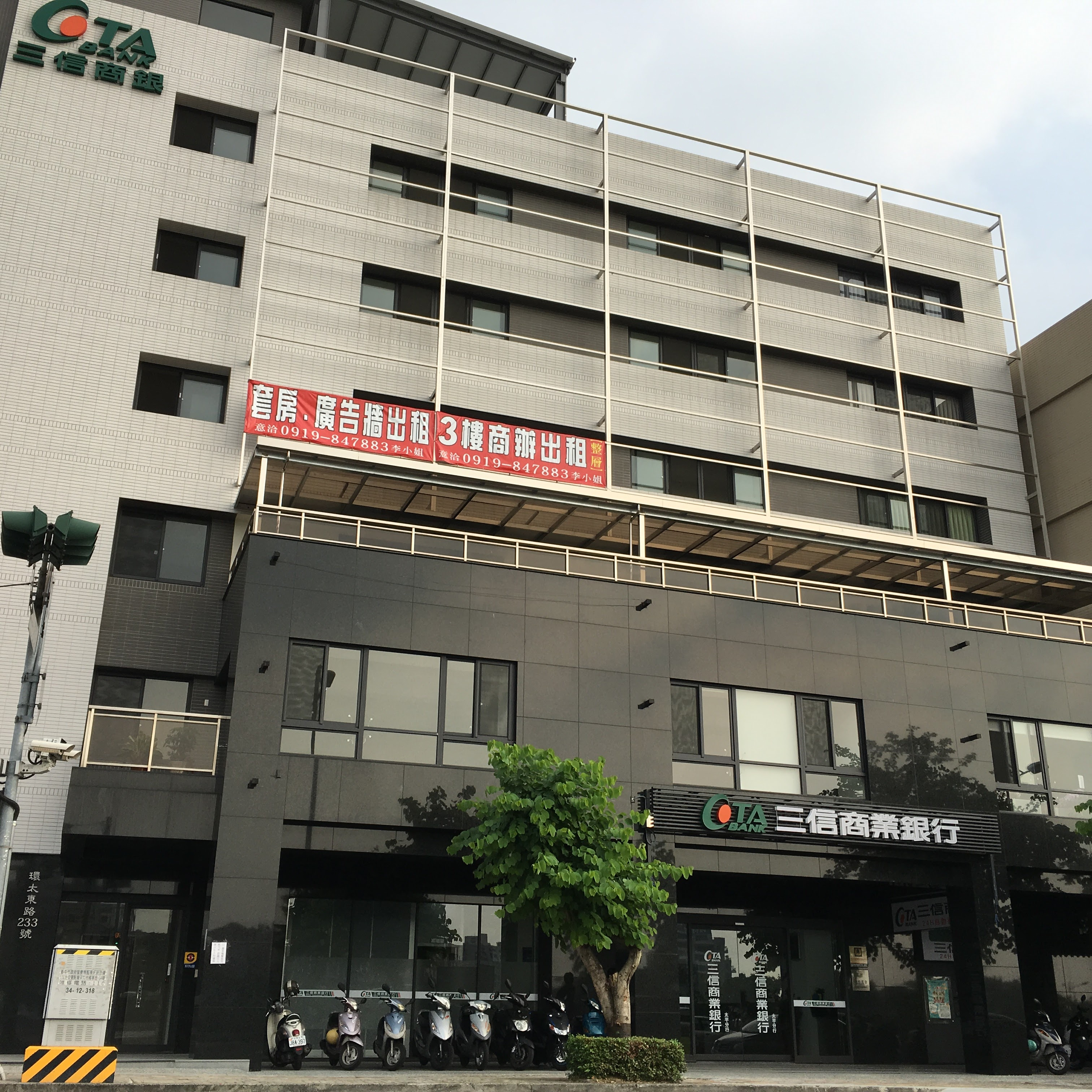 三信商業銀行太平分行